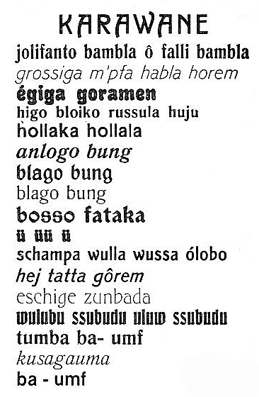 Hugo_ball_karawane Selbst eingescannt am 21.2.2005. Gemeinfrei, da kein Copyright mehr. - Das Bild zeigt das Gedicht Karawane von Hugo Ball († 1927).